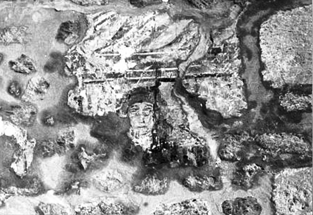 Fresque de l'église paroissiale